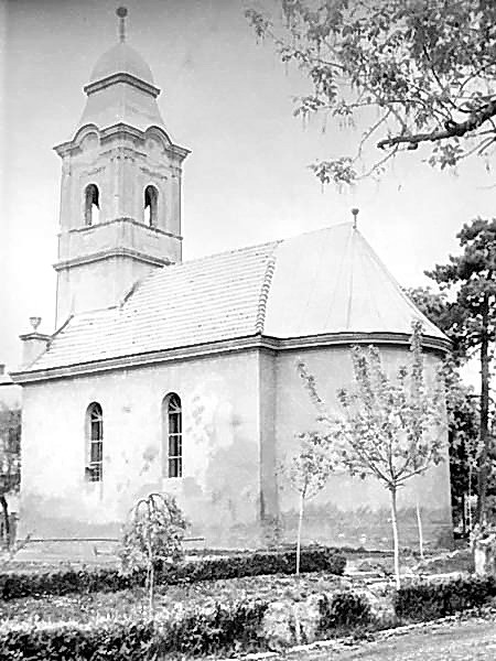 Biserica Luterana (imagine din anul 1922), demolata in anul 1986, Piata 1 Decembrie 1918